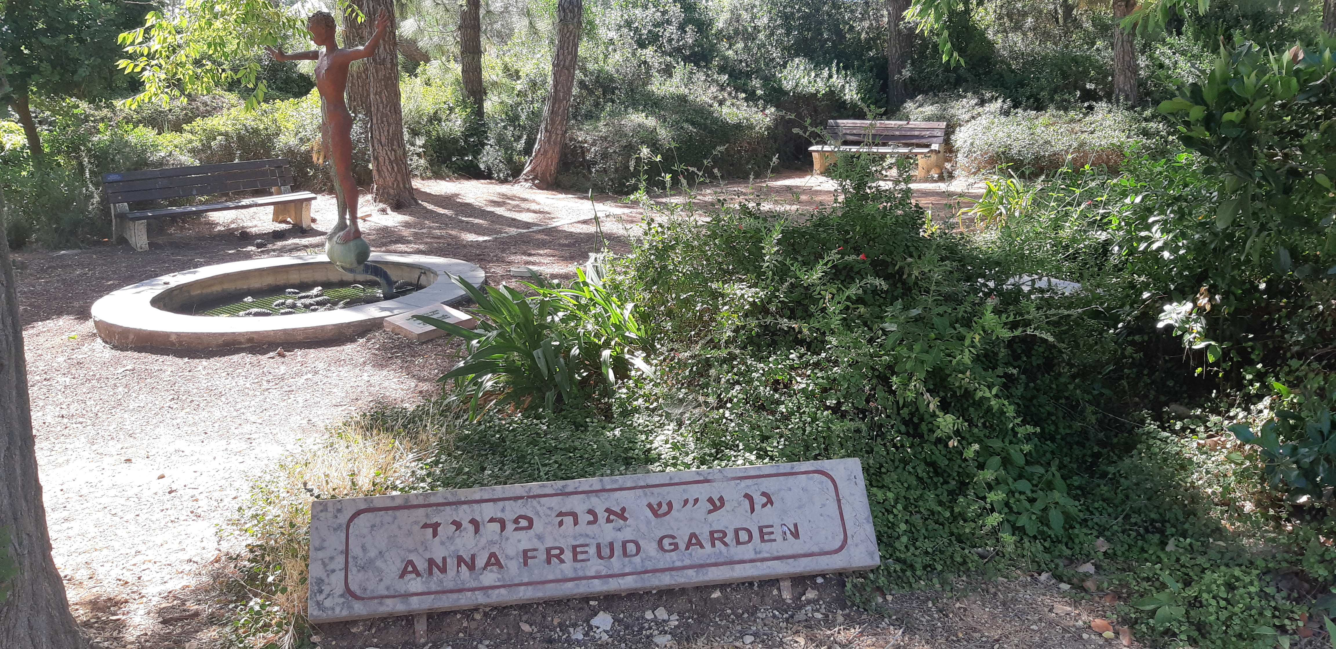 גן על שם אנא פרויד בגבעת רם